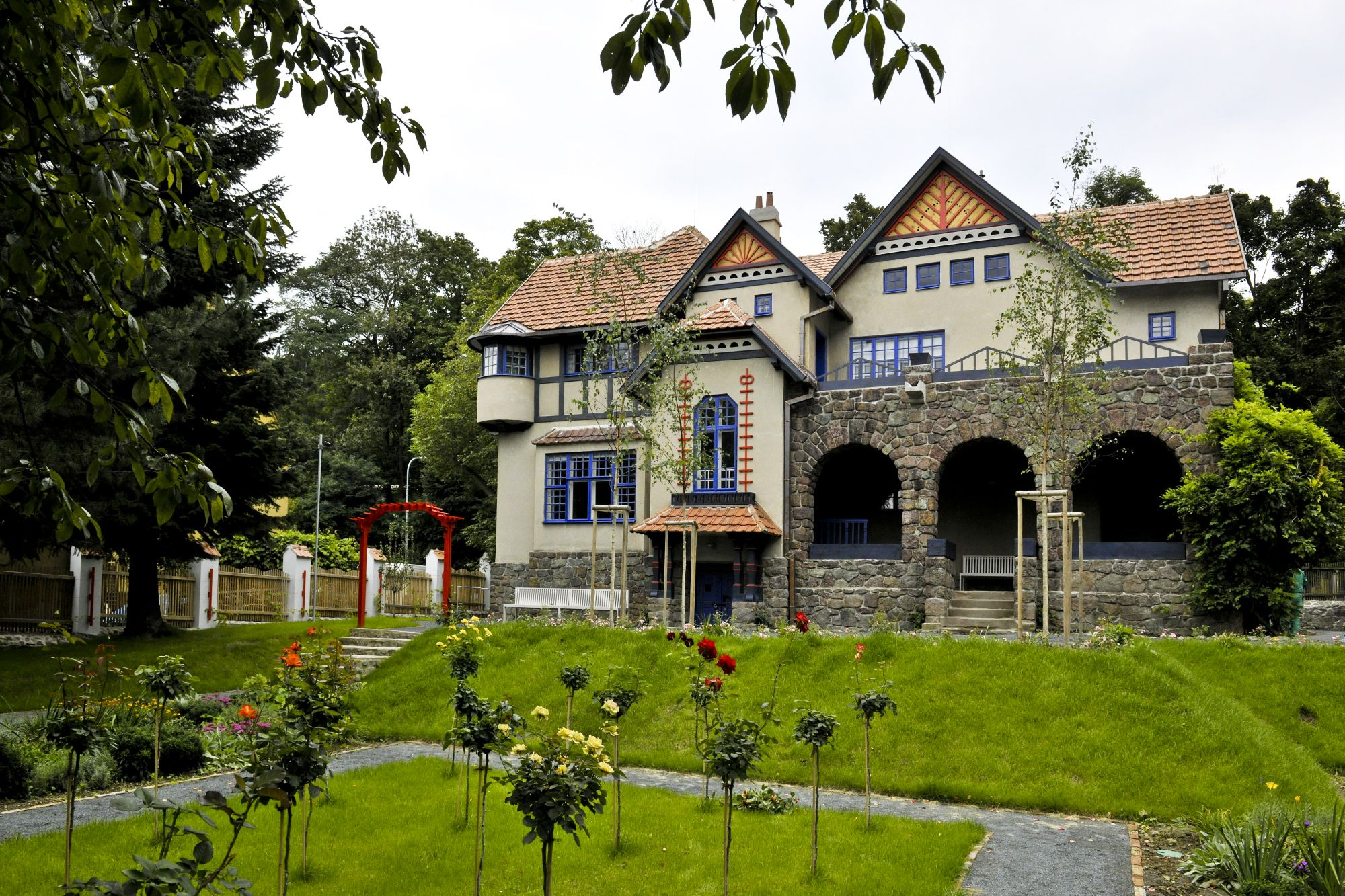 Jurkovičova vila pohled ze zahrady